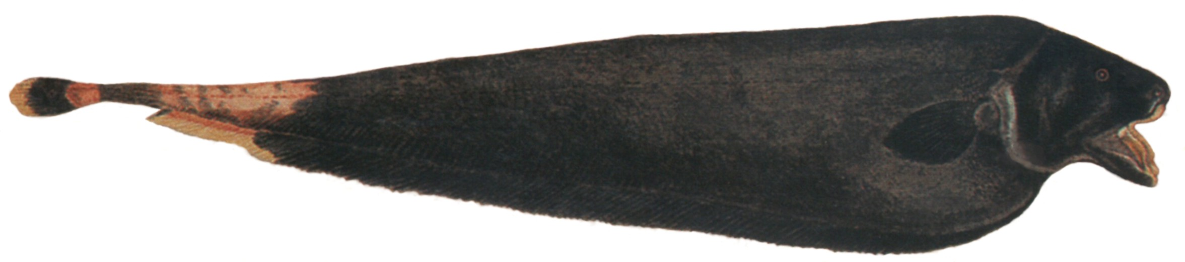 Desenho de um ituí-cavalo (Apteronotus albifrons), por Johann Natterer, parte da missão ao Brasil de naturalistas do imperador austríaco Francisco I, de 1817 a 1835